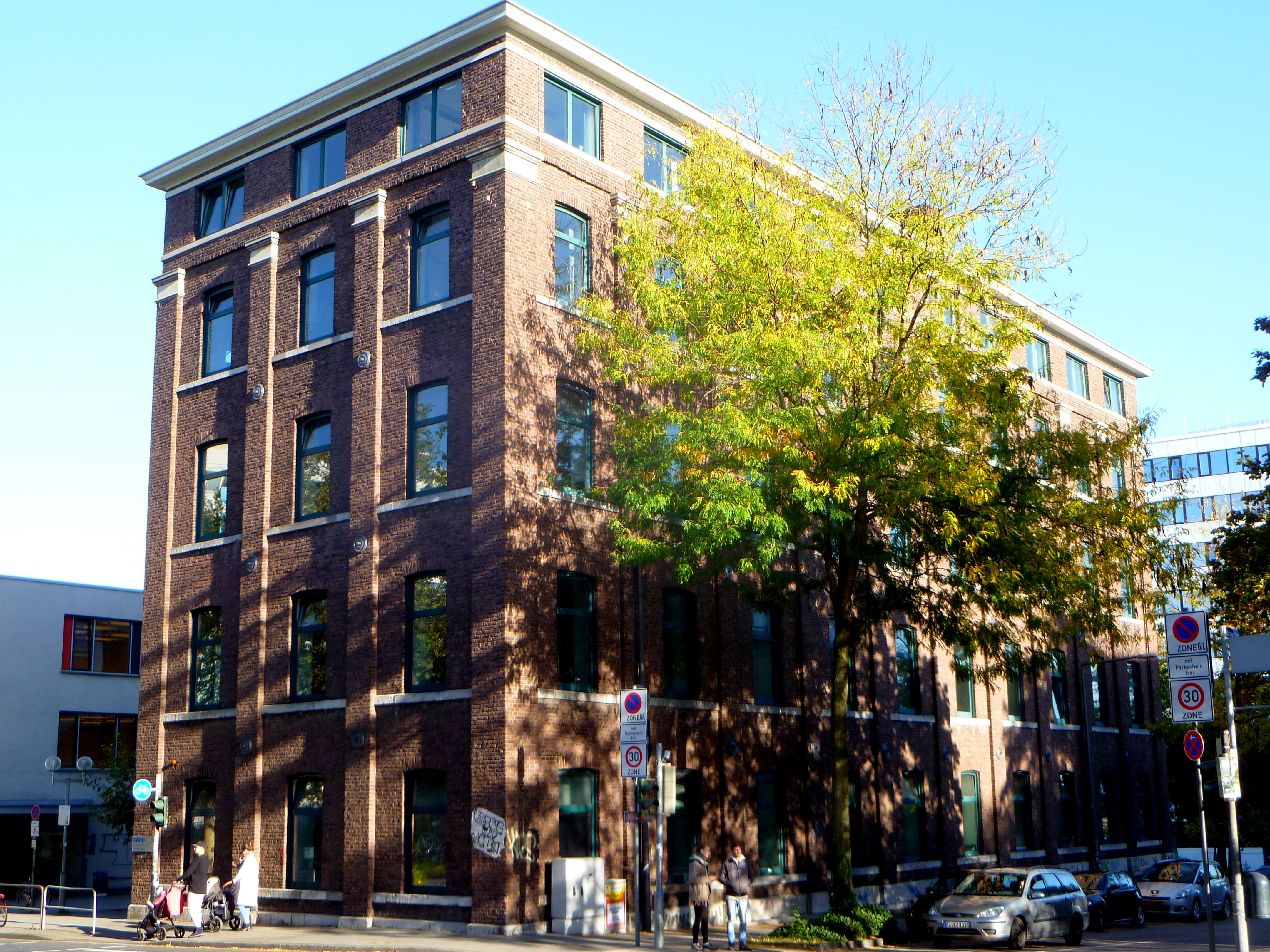 ehem. Tuchfabrik Marx & Auerbach Templergraben/Eilfschornsteinstraße in Aachen